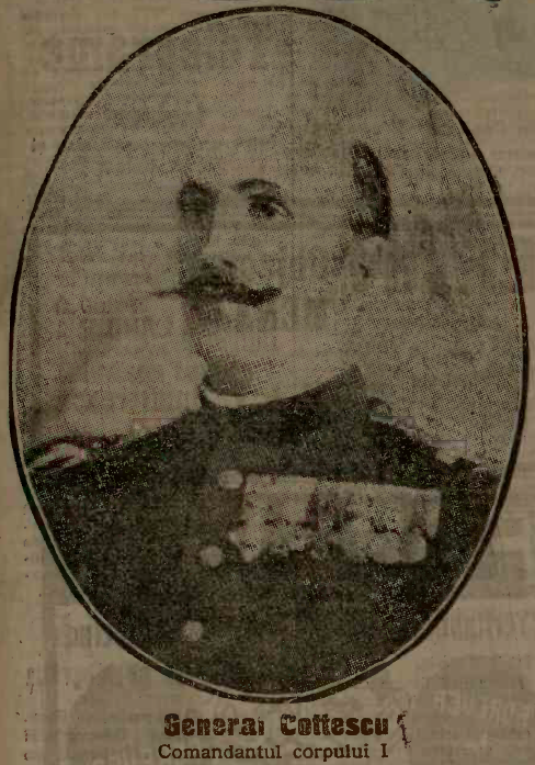 Generalul Dumitru Cotescu, comandantul Corpului II Armata la începutul Primului Război Mondial Sursa - ziarul Adevarul din 22 iunie 1913 Restricţii - fără restricţii datorită vechimii